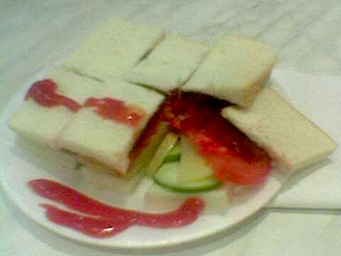 Vegetable sandwich